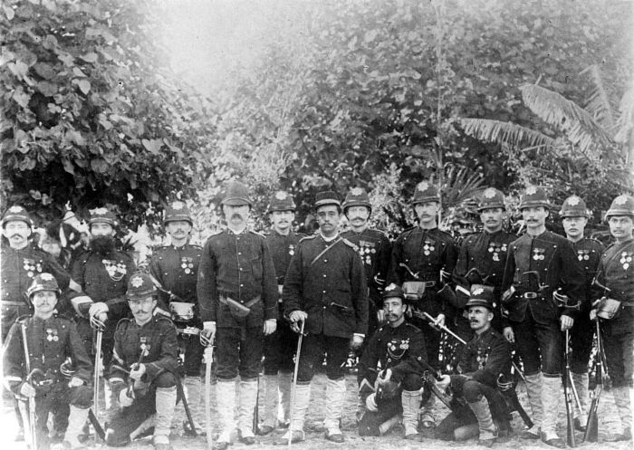 Repronegatief. De eerste Divisie Marechaussee in 1892: kapitein Notten en luitenant Nolthenius met het administratief kader en alle brigade commandanten